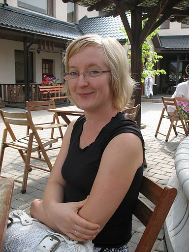 Sirli Pehme